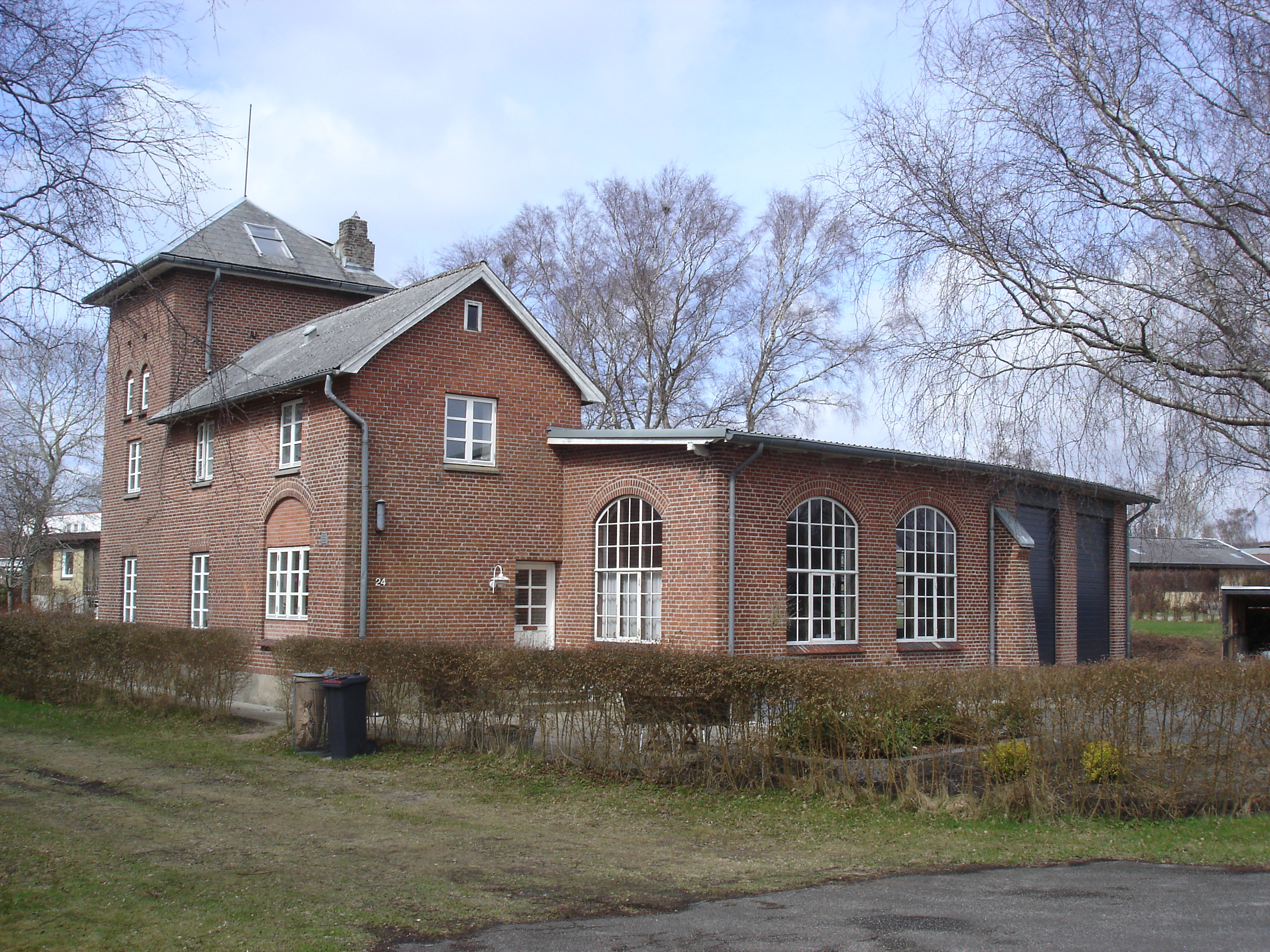 Vodskov Remise fra Ø